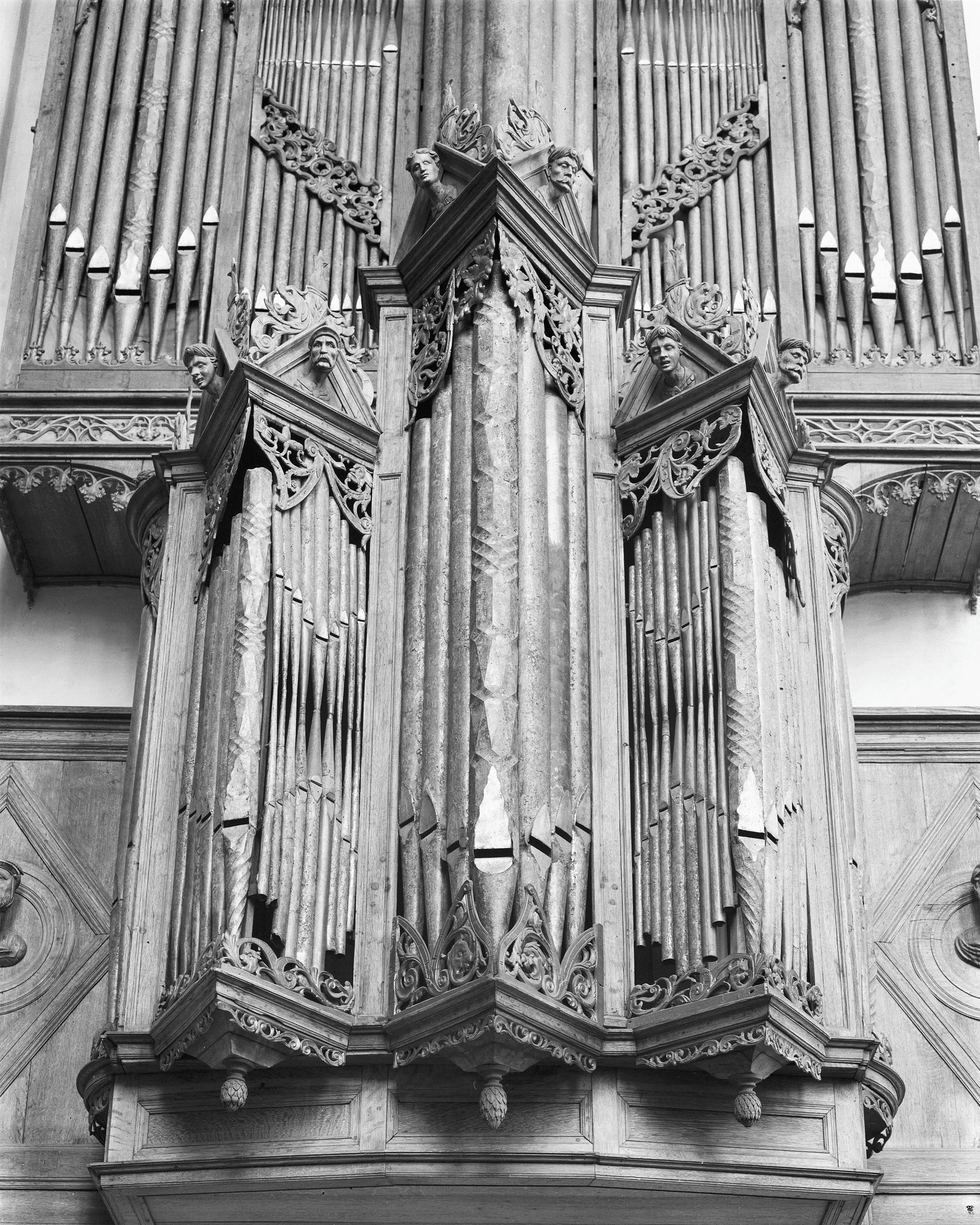 Nederlands Hervormde Koor Kerk: rugwerkkas van het orgel afkomstig uit Utrecht Nicolaikerk